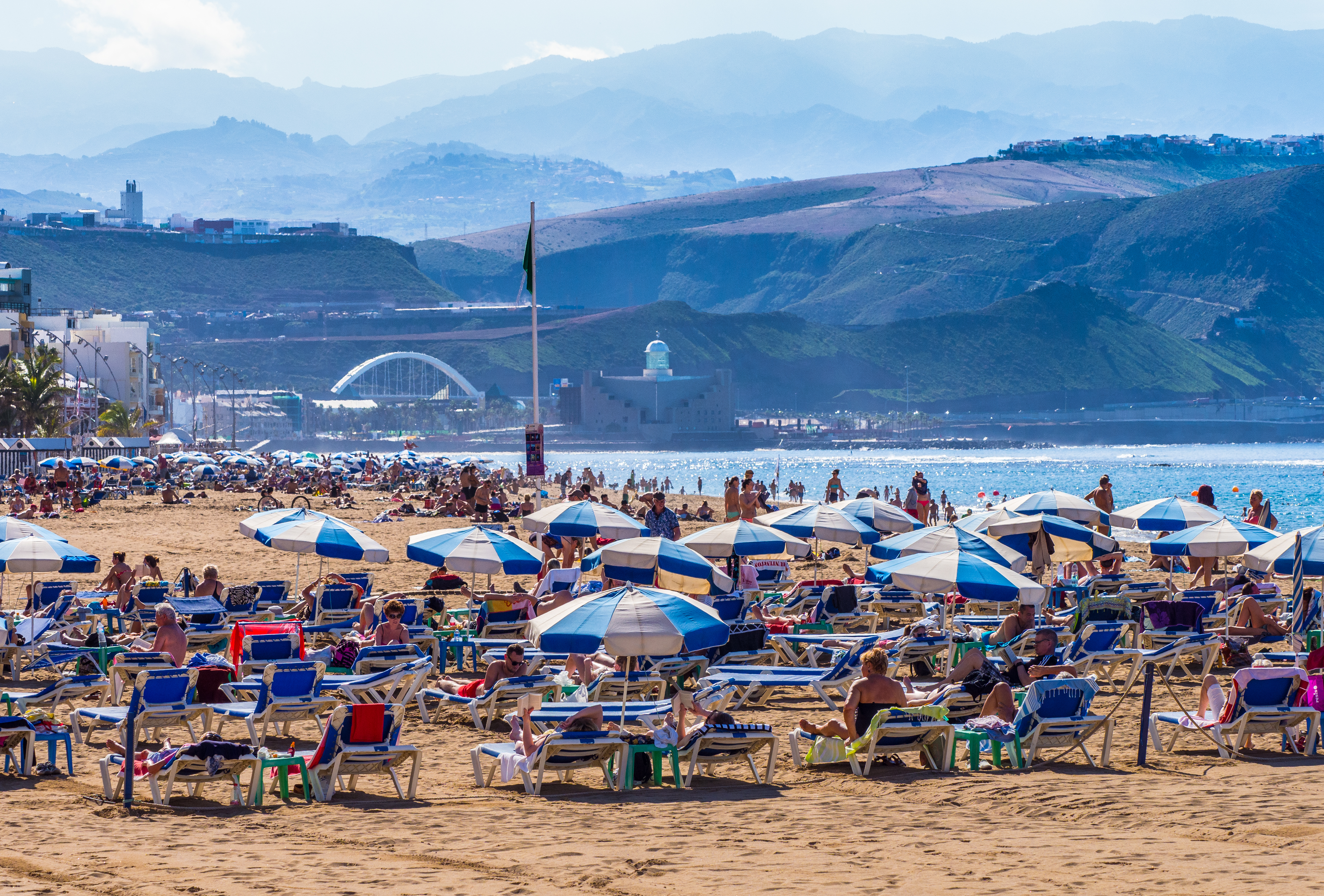 Playa Canteras Las Palmas